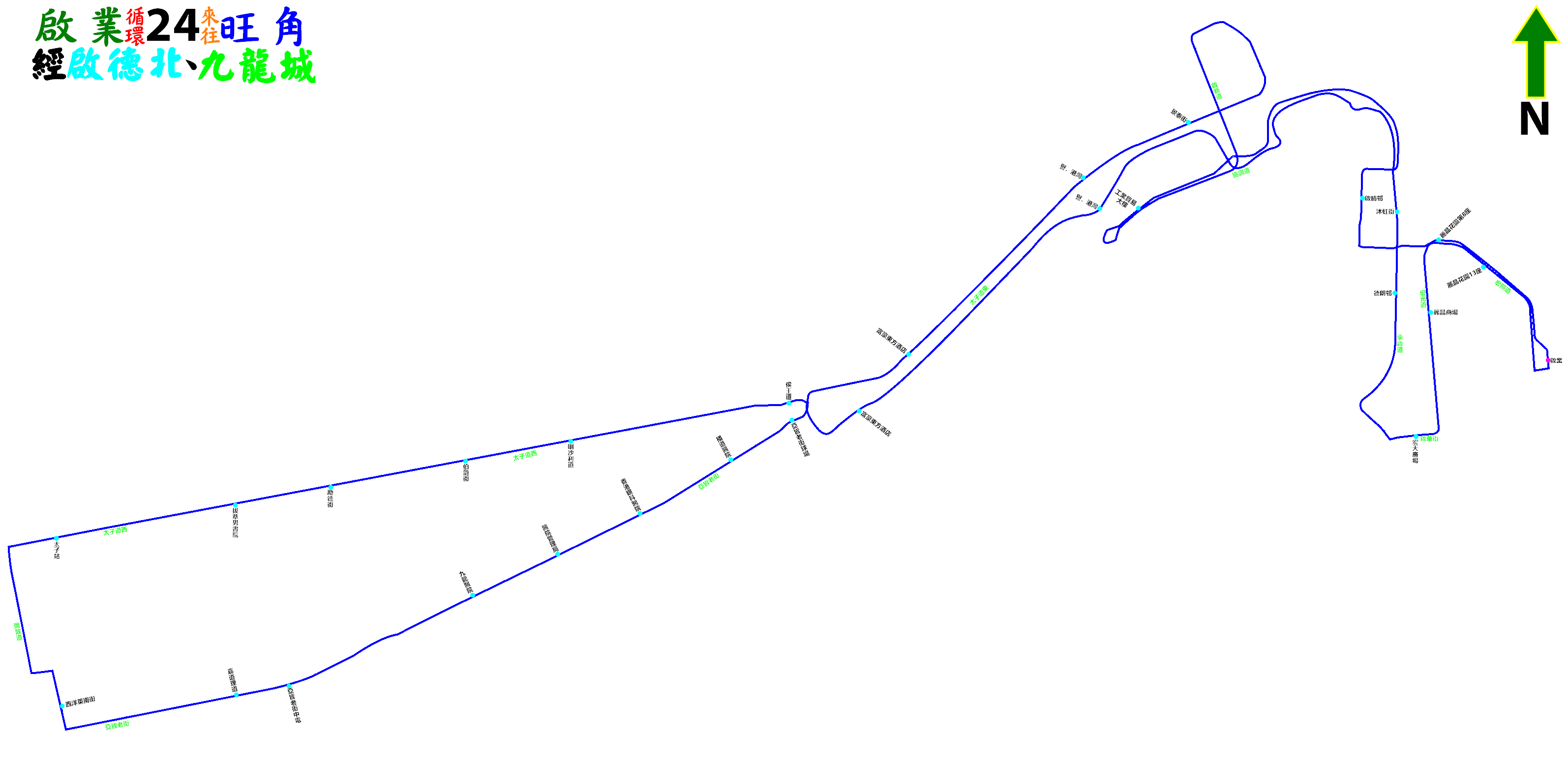 中文（香港）: 九巴24線的走線圖